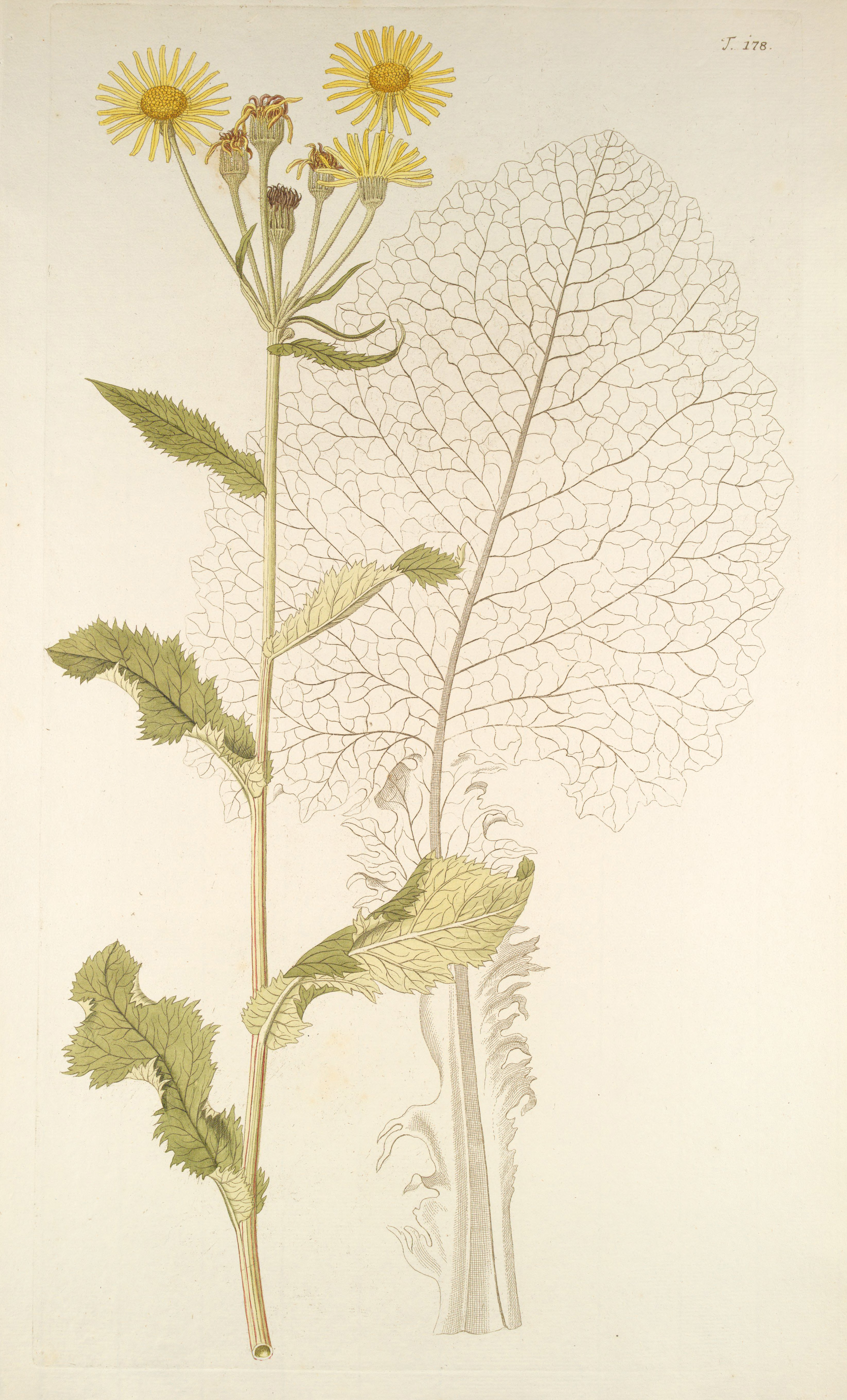 Jacquin, N. J. (1774) Florae Austriacae. 2. Band. Kaliwoda, Wien. Tafel 178. (als Cineraria crispa)